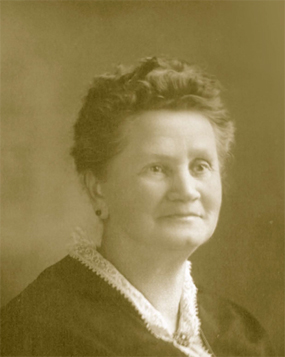 Charlotte Hill